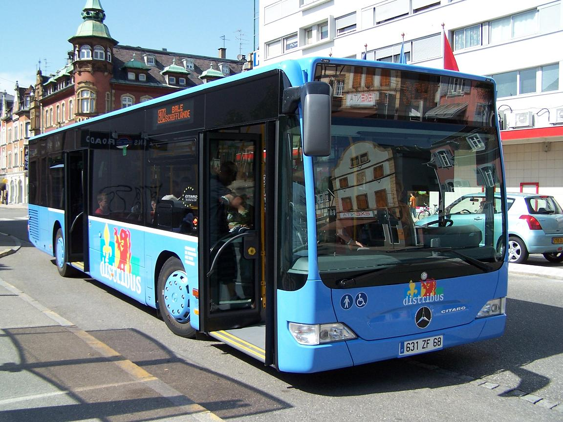 image